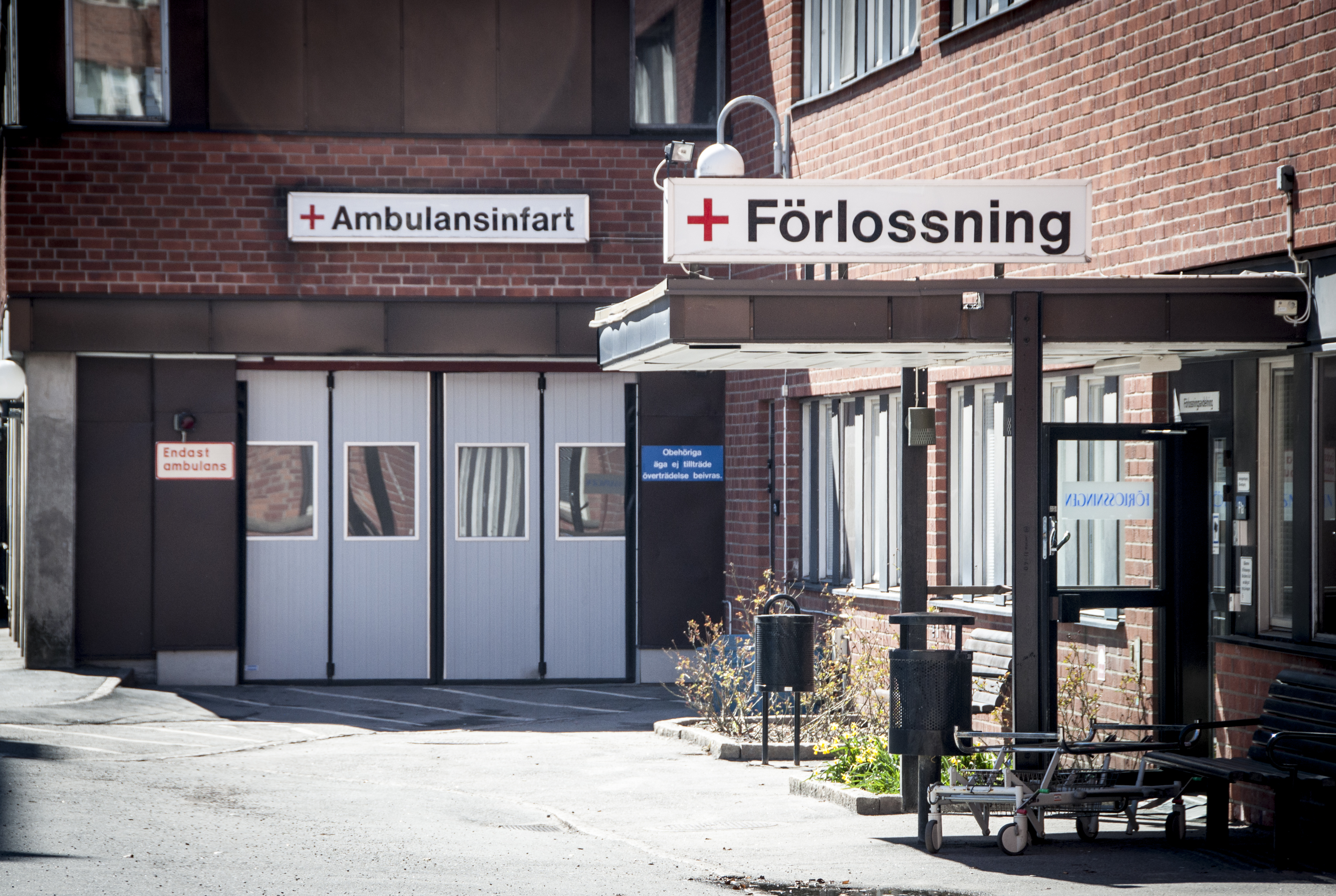 Karolinska Solna, förlossning ambulansinfart